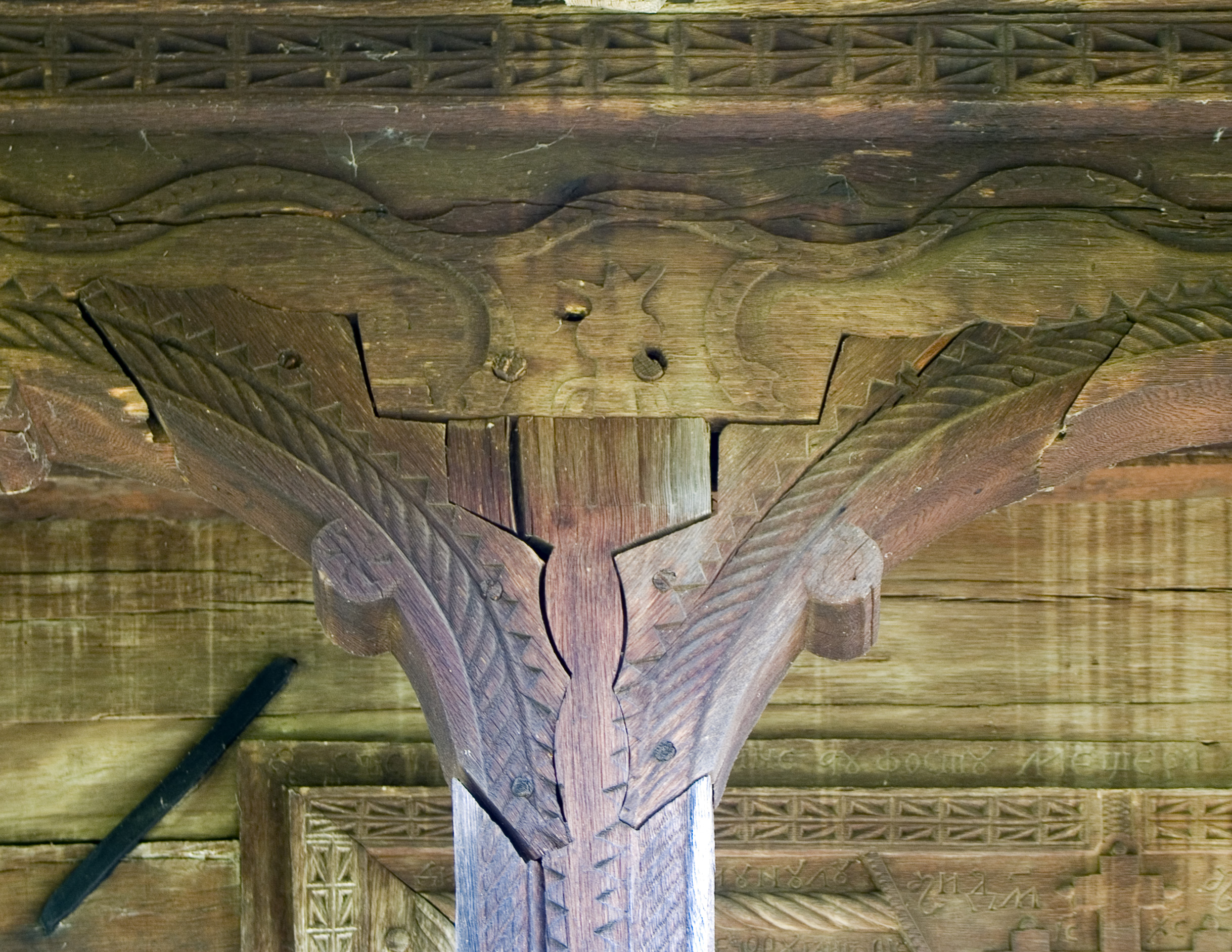 Fildu de Sus, Sălaj: biserica de lemn. Fruntarul sculptat al tindei, peste intrare. „Iisus împărat” cioplit pe fruntar în axul stâlpului.